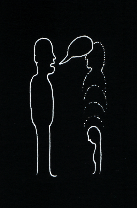 Illustrasjon: De fem hersketeknikker